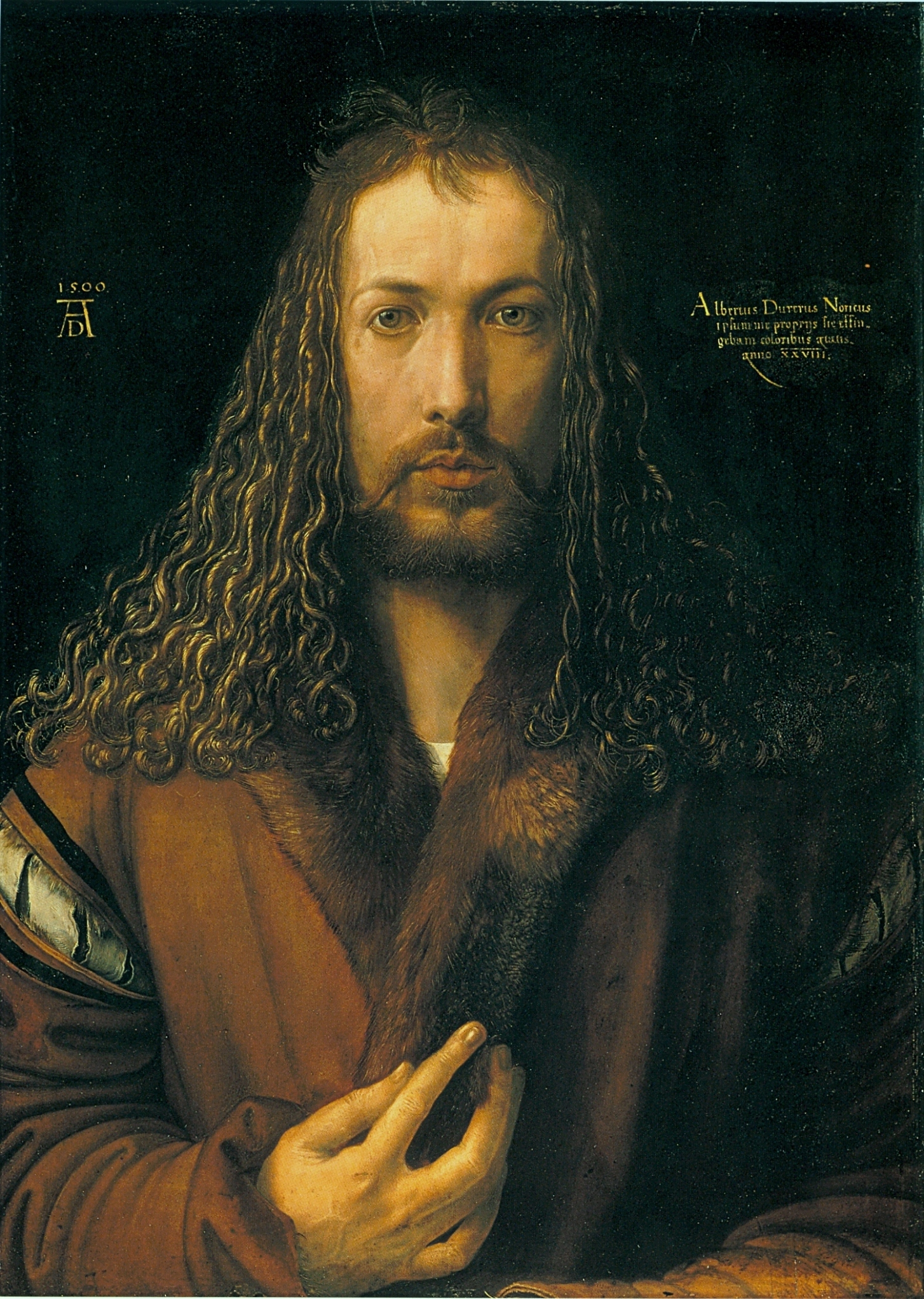 Frontalporträt mit Idealisierung vergleichbar mit Christusdarstellungen; betonter Blick und die schöpferische Hand als Werkzeuge des Künstlers